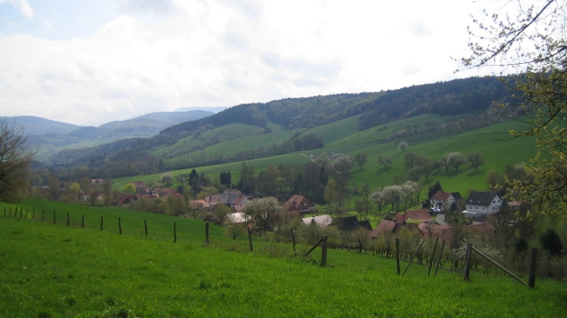 Blick auf Neuseesen vom Winterberg, Stadtteil von Witzenhausen